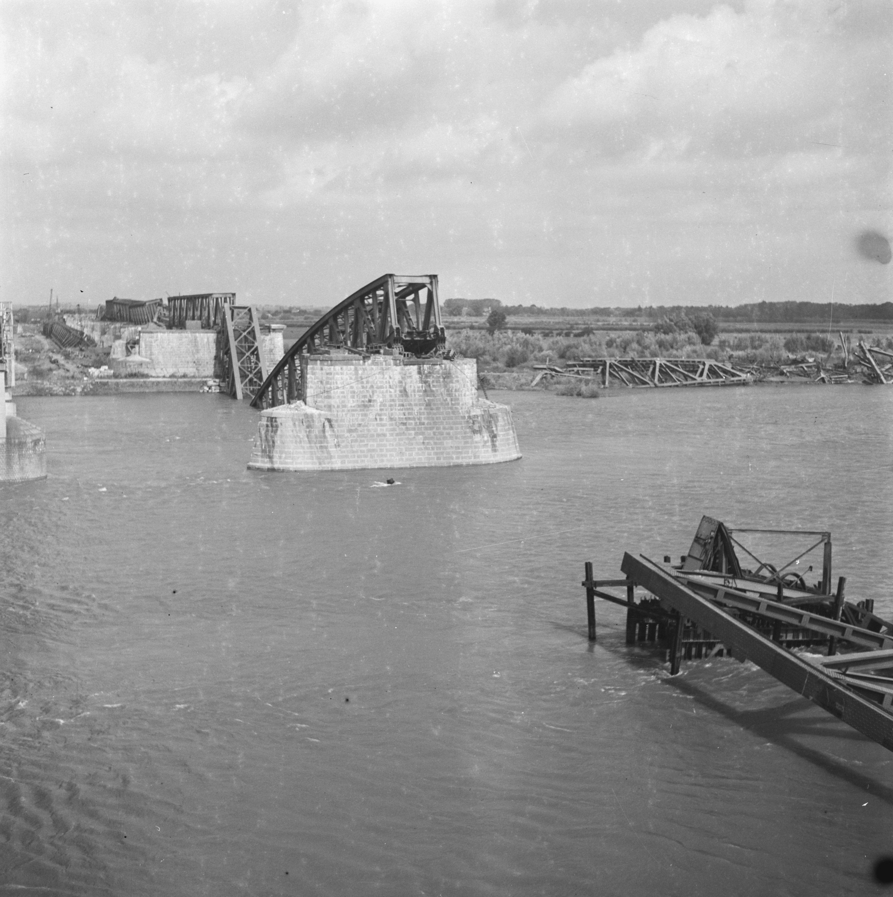 Collectie / Archief : Fotocollectie Anefo Reportage / Serie : Vernielingen: Moerdijk Beschrijving : Moerdik Datum : augustus 1945 Locatie : Amsterdam, Noord-Holland Trefwoorden : bevrijdingsfeesten, tweede wereldoorlog Persoonsnaam : Berger, Chris, Briels, Carel, Hartung, [...] Fotograaf : Windig, Ad / Anefo, [onbekend] Auteursrechthebbende : Nationaal Archief Materiaalsoort : Negatief (zwart/wit) Nummer archiefinventaris : bekijk toegang 2.24.01.03 Bestanddeelnummer : 900-6703